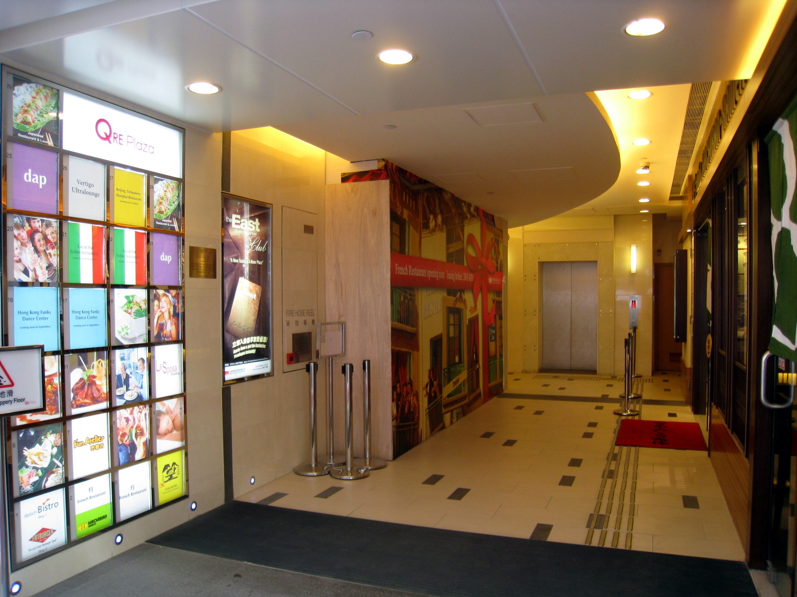 HK QRE Plaza